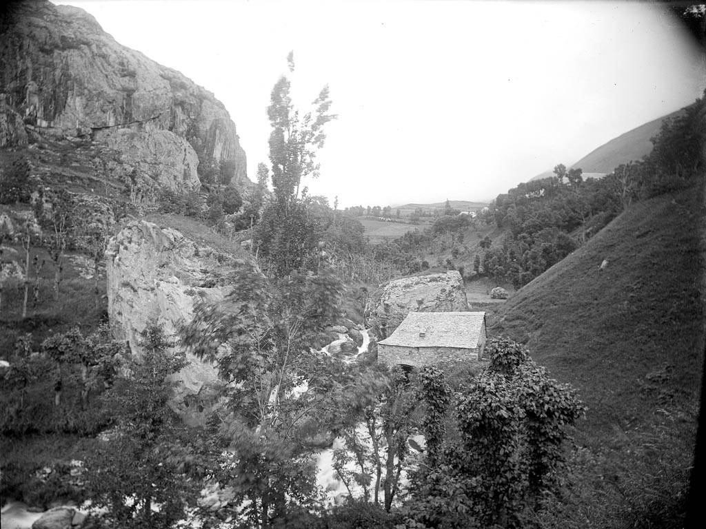 Imatge